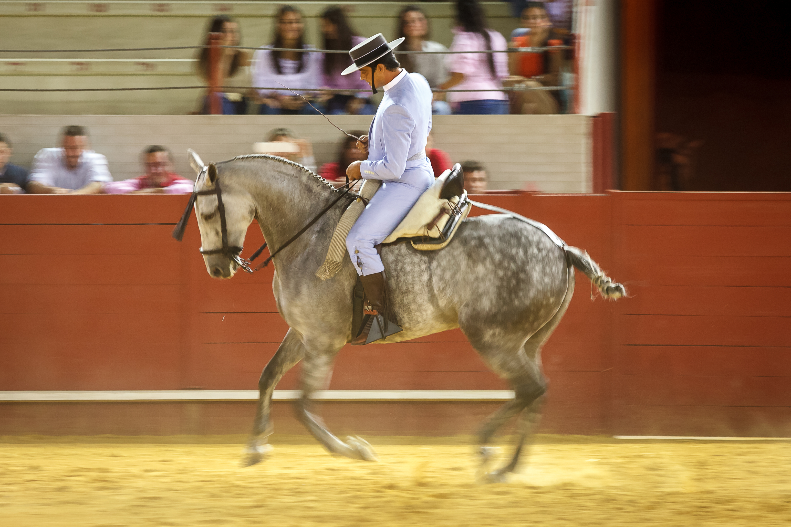 Couple cavalier/cheval en tenue lors d'une présentation de Doma vaquera.